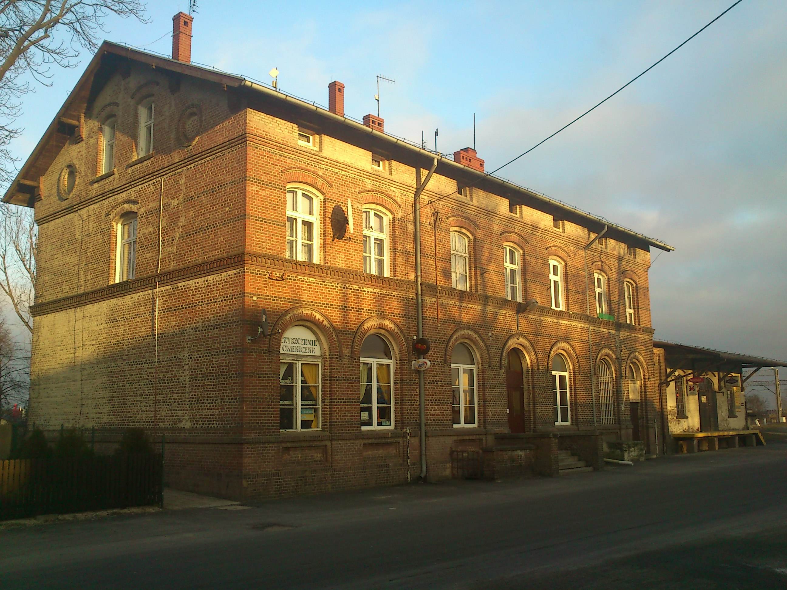 Stacja kolejowa w Rokietnicy